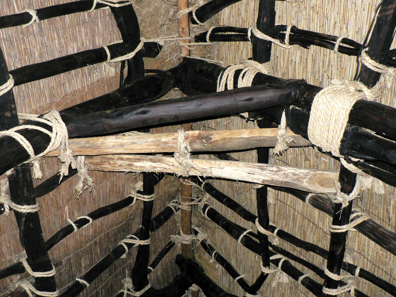 富山県南砺市（旧平村） 越中五箇山 相倉合掌集落 3階屋根裏の構造